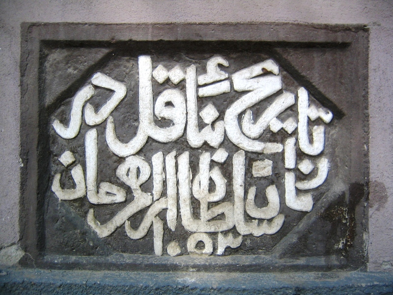 Inscripție turcească prezentă pe fațada principală a clădirii Primăriei Vechi, Piața Libertății din din Timișoara